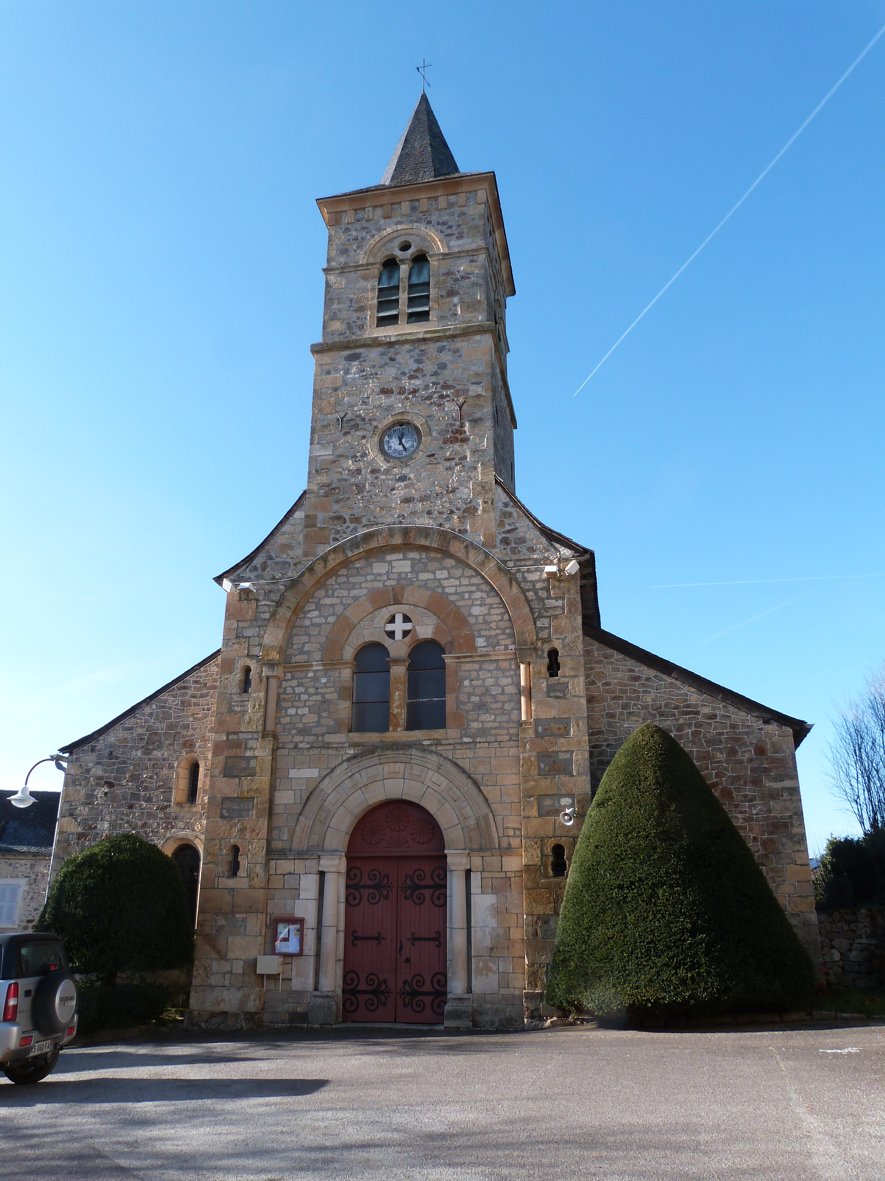 Façade Est de l'église Saint-Hilaire (Maleville)